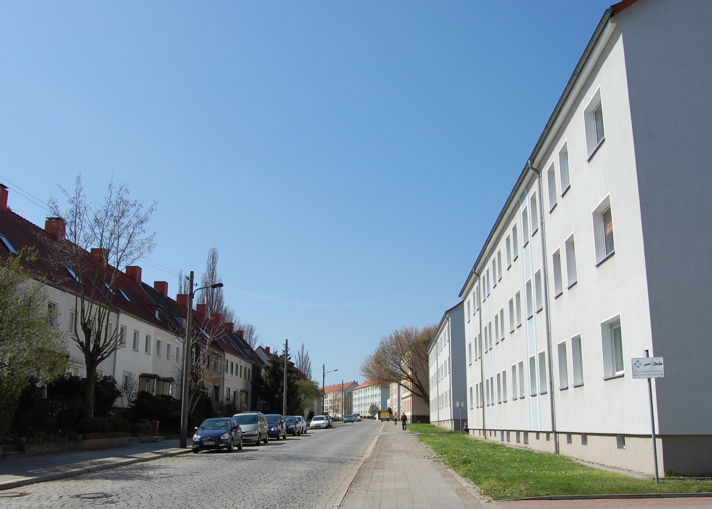 Welsleber Straße in Westerhüsen, Blick von Osten